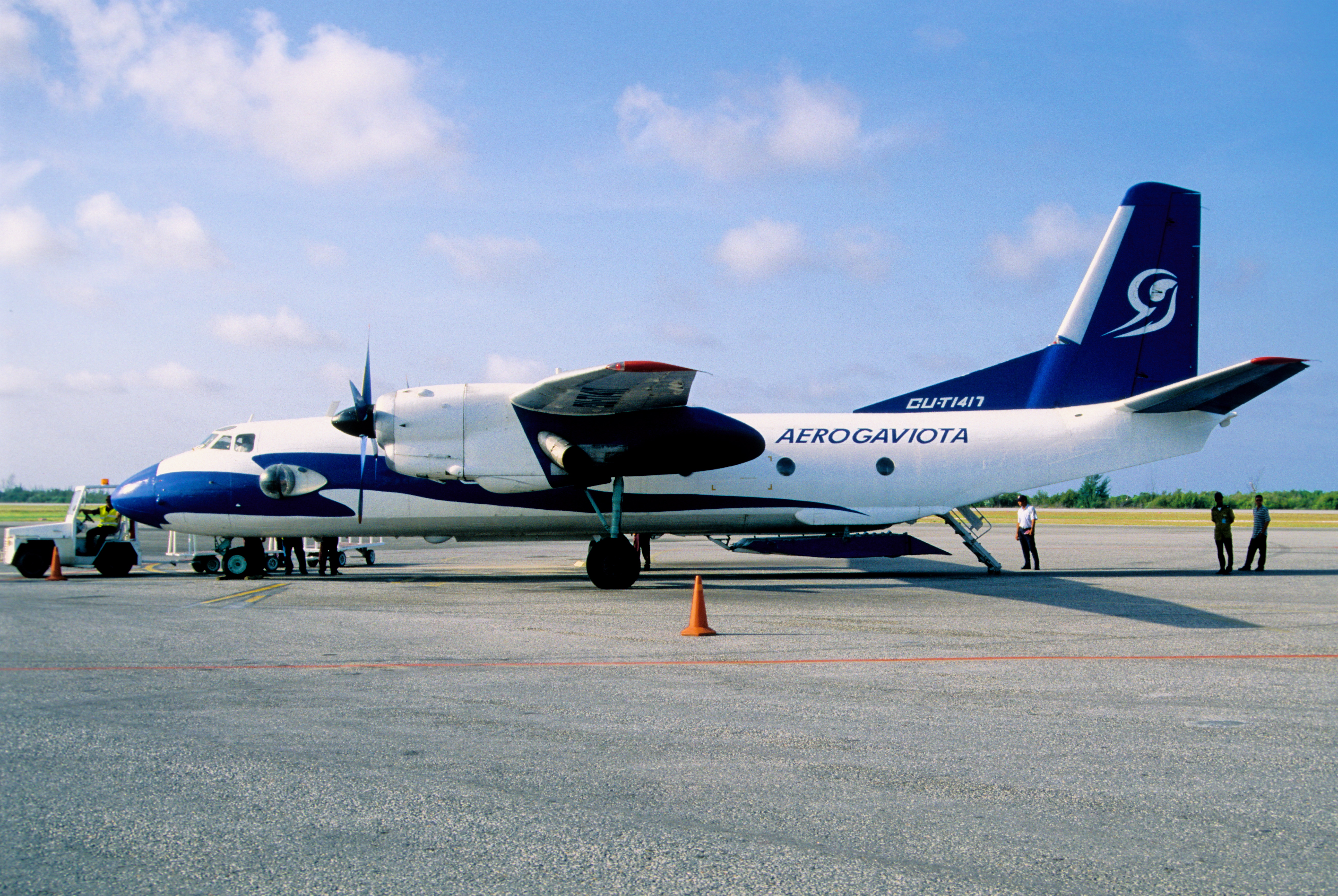 300ad - Aerogaviota Antonov 26; CU-T1417@CYO;23.6.2004